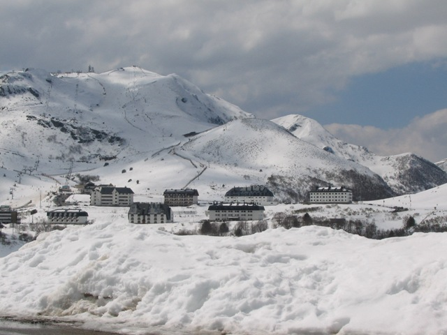 Esatación de Valgranda-Pajares